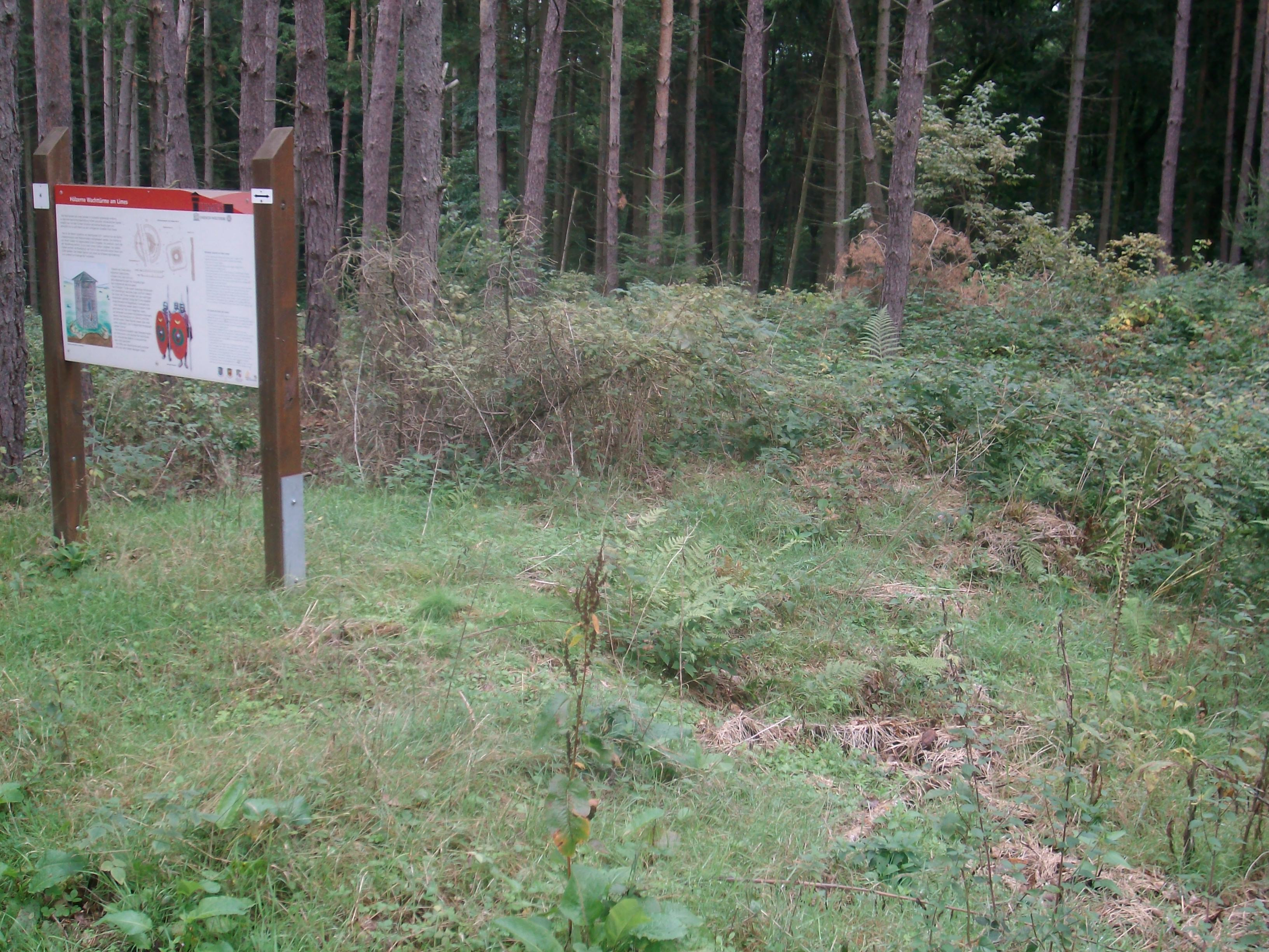 Wachposten 3/5* am Limes am Römerrundweg Hohenstein